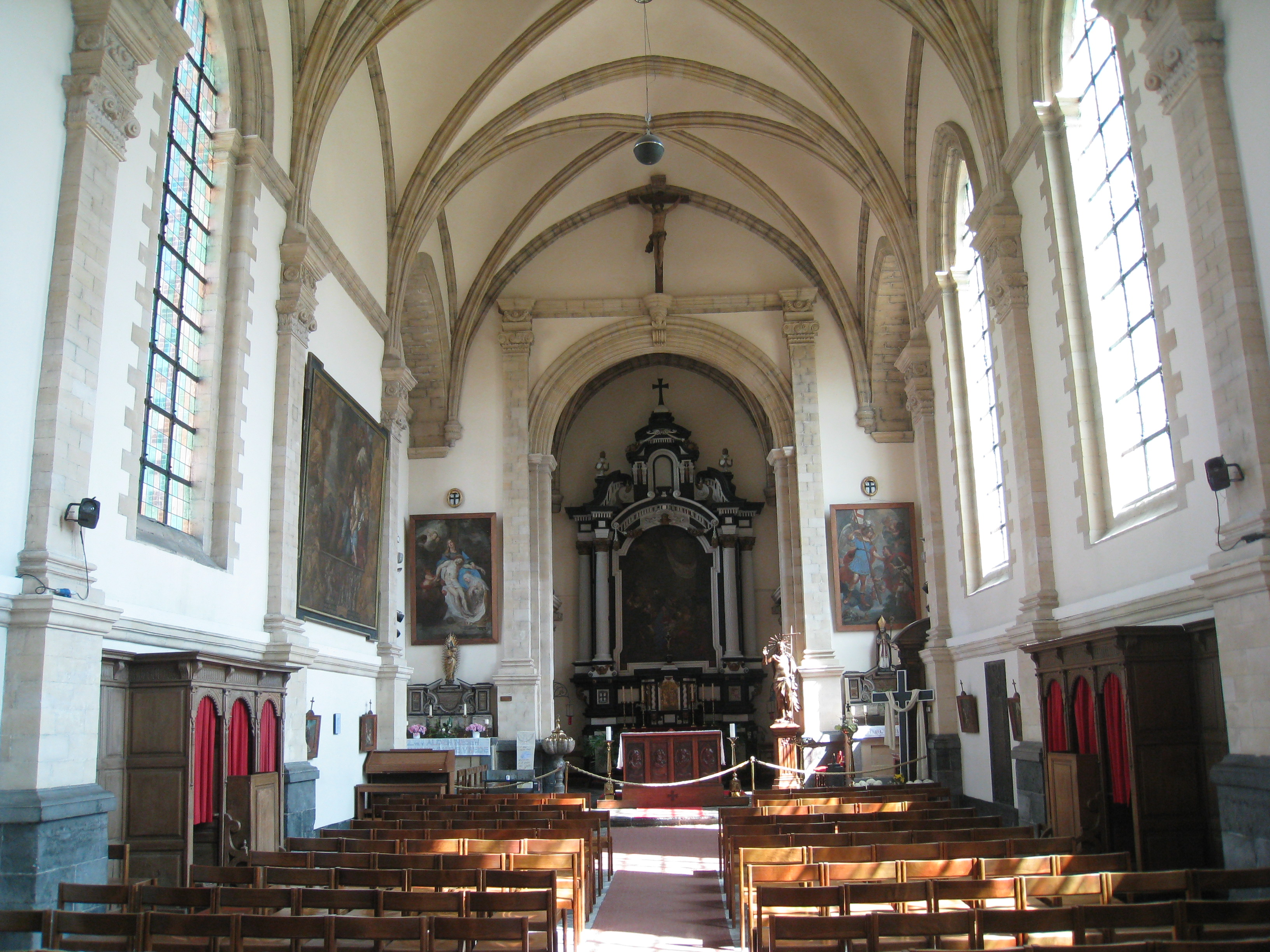 Schijntransept in kerk Alden Biesen, Bilzen, België